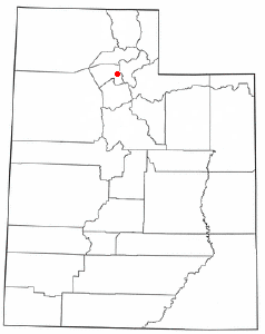 Map